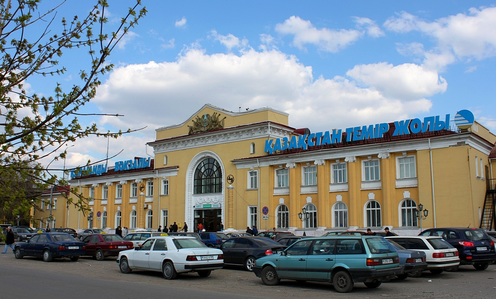 Железнодорожный вокзал Караганды